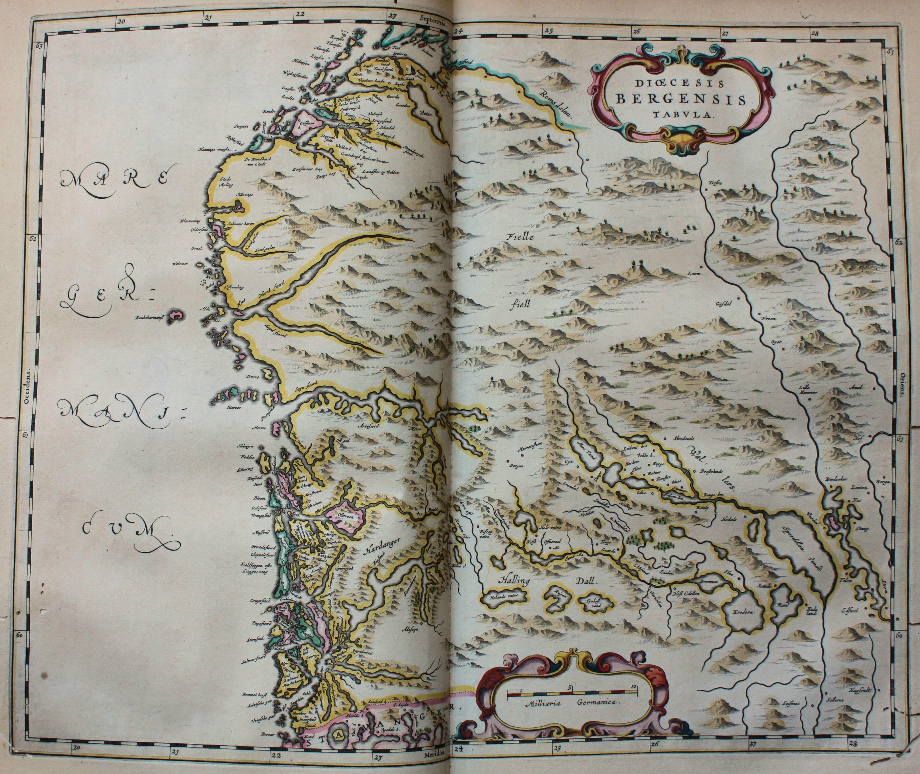 Descripción bibliográfica: Geographia Blaviana. - [Amsterdam : Juan Blaeu, 1659] . - [32], VI, 96 p., 34 f., h. 35a, 35b, 35c, 35d, 36-44 f., 34, [2], 36-40, [2], 43-70 [i. e. 75], [1] f., [20] p. de map., [9] f. de map., [4] f. pleg. de map., [2] f. de plan., [2] f. ge grab. : |bil. ; |cFol. marca major (57 cm.) . - En la dedicatoria a Felipe IV: "Presenta ... El Atlas Universal y Cosmographico de los orbes y terrestre ... Juan Blaeu" . - Título tomado del frontispicio. -- Privilegio fechado en 1659. -Errores de pag. - Sign.: 1, *2, **3, ***-****2, a-e2, A-I2, K1, L-Z2, Aa-Dd2, 4 2, Ee-Ff2, A-I2, K1, L2, M1, N-Y2, Z5, Aa-Dd2, Ee1, A-D2, E-F1, G-I2, K-L1, M-O2, P1, Q-Z2, Aa-Bb2, Cc1, Dd3, Ff-Zz2, Aaa-Bbb2, . - Frontispicio grab. col. -- Incluye un total de 49 il. entre map., plan. i grab. Materia: Atlas - Obras anteriores a 1800 Impresor: Blaeu, Joan, 1596-1673, imp. Lugar de impresión: Holanda. Amsterdam Localización: Vea la ilustración en su contexto Visite también la exposición "Cartografía histórica en la Biblioteca de la Universidad de Sevilla"